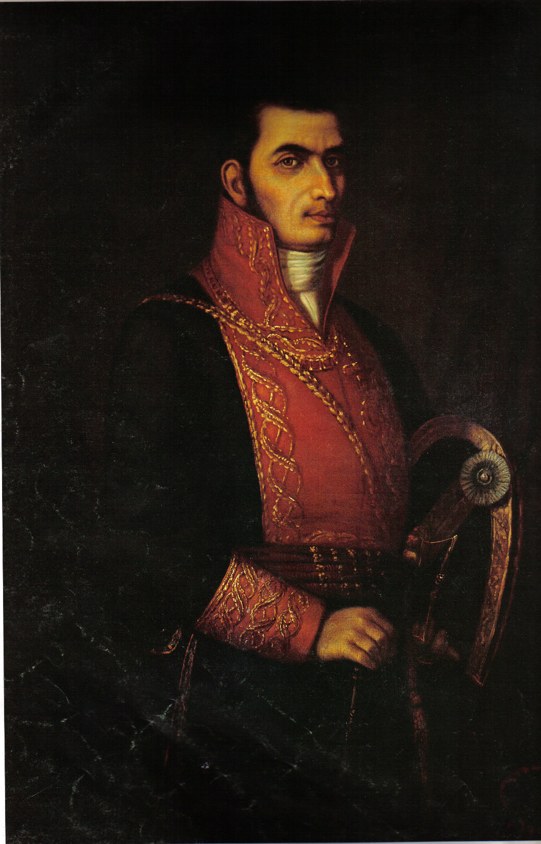 José María Morelos (1765-1815)